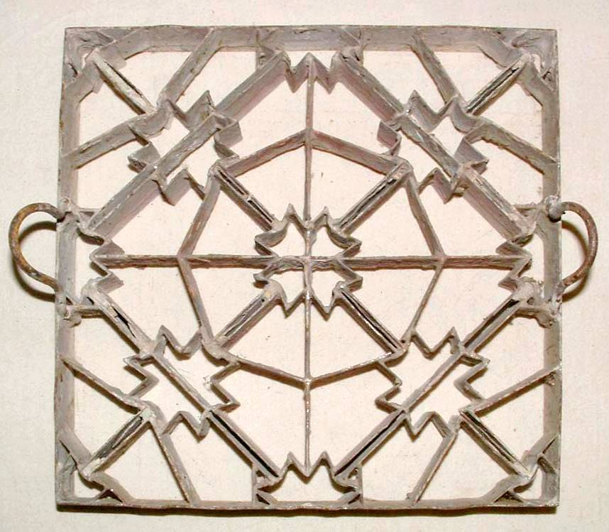 Moule à carreau, vers 1920, France.